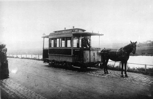 pferdebahnwagen der „Pferdebahn Cassel-Wolfsanger G.m.b.H.“ an der endstation kassel-wolfsanger 1897 Kategorie:Bild:Straßenbahn